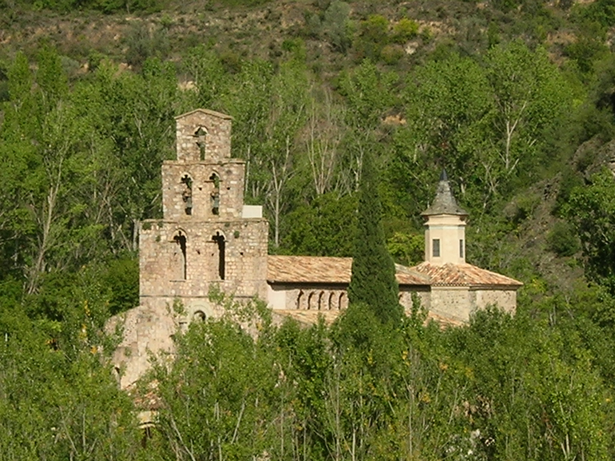 Església de Santa Maria de Gerri (Baix Pallars)